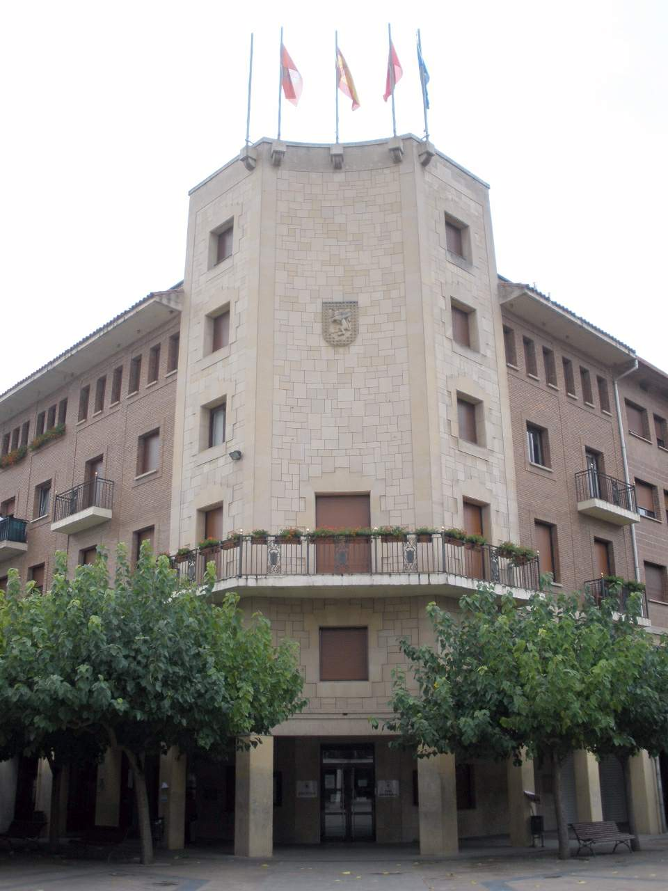 Ayuntamiento de Huarte-Uharte (Navarra)